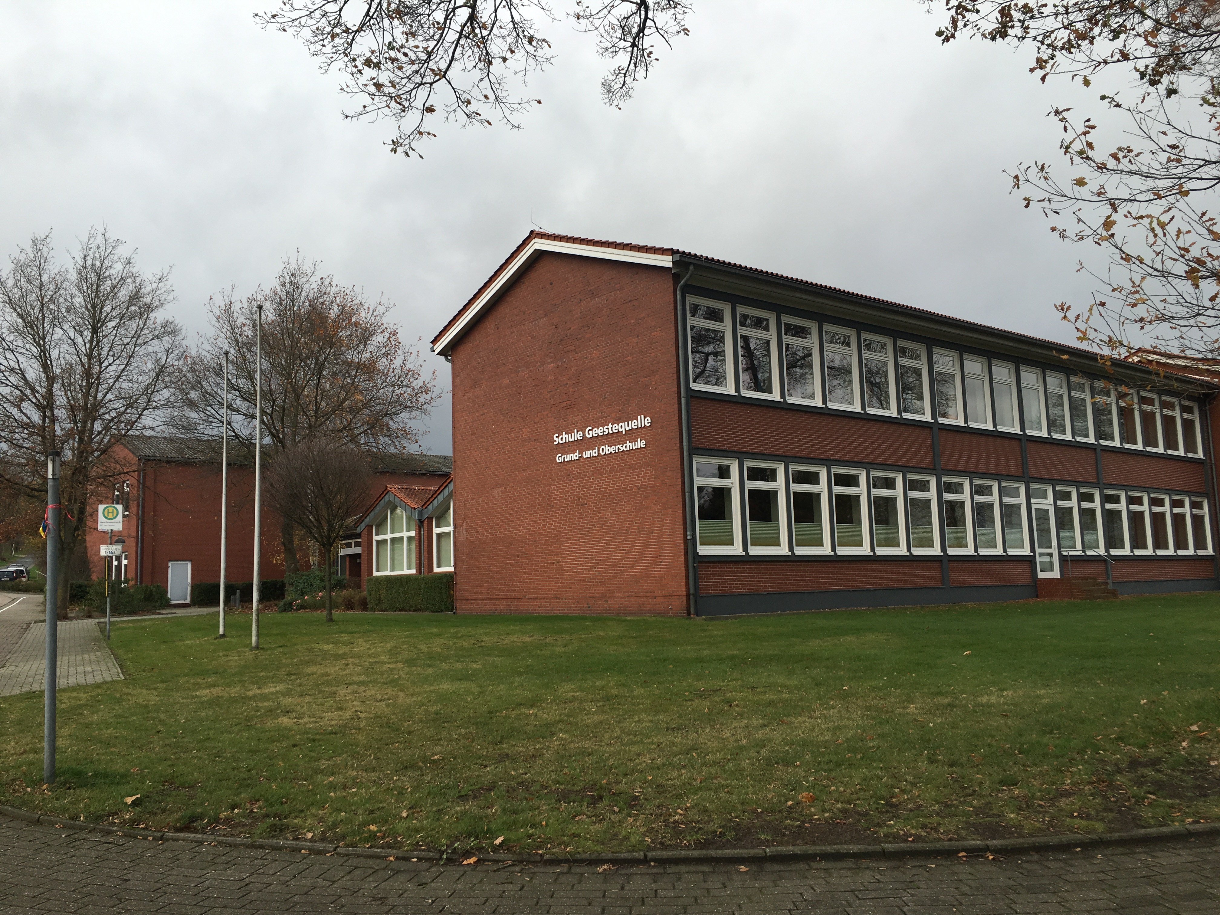 School Geestborn in Örel